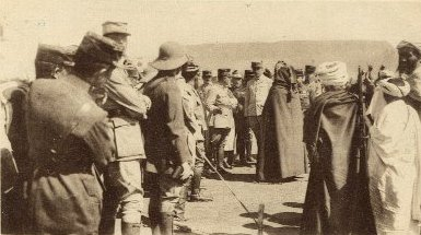 Autorisation accordée par:Webmaster:Alexandre Auteur et droits sur cette photo :Copyright © Photo:Soumission du pacha hassan 1920 à Poemyrau